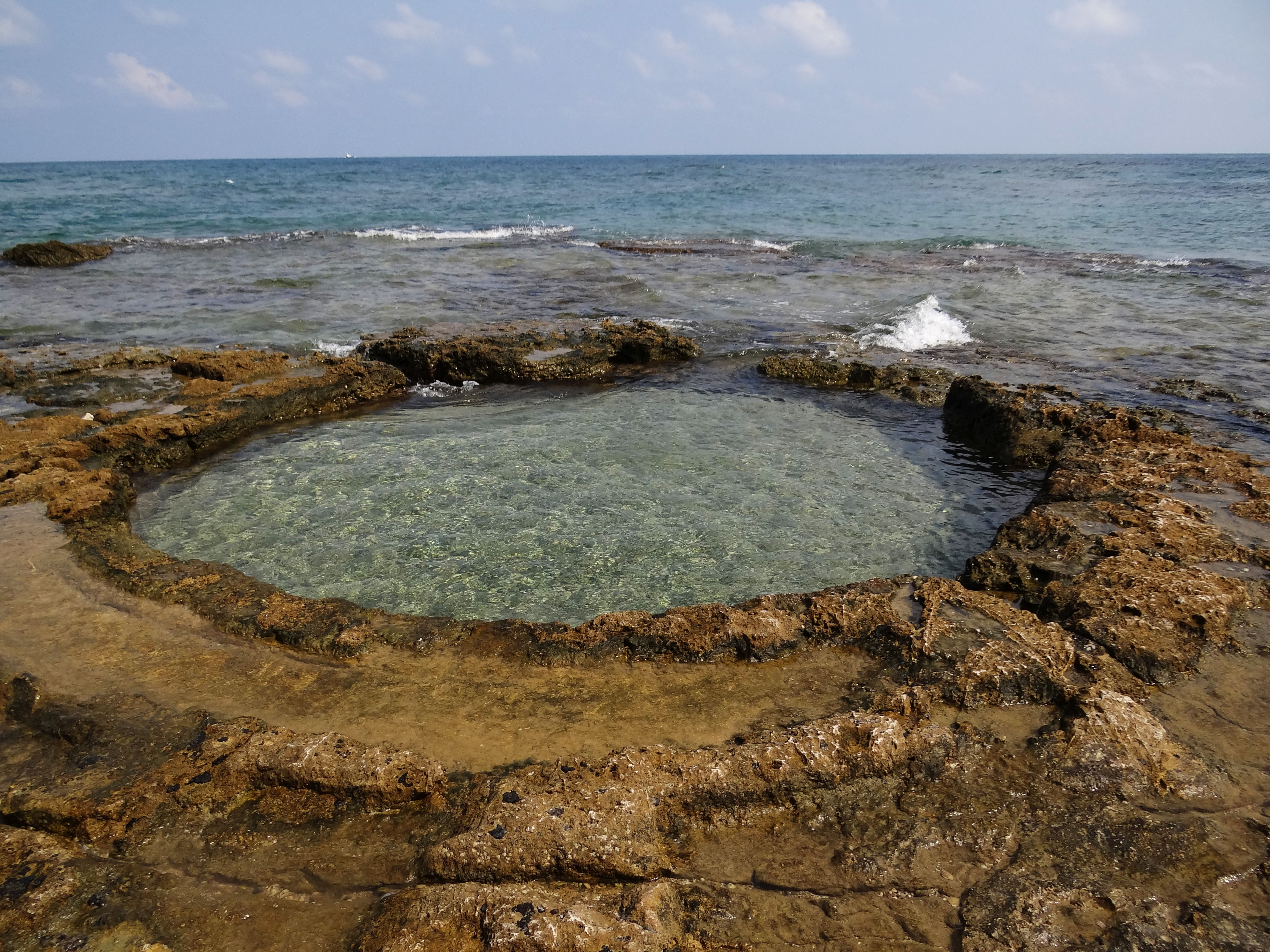 תל קדום השוכן על חוף הים במערב העיר חיפה מול שכונת עין הים, ומדרום לשכונת בת גלים. שטחו של התל כשמונה דונם וגובה הנקודה הגבוהה ביותר בתל לפני התחלת החפירות היה 12.74 מטר מעל פני הים. מקור השם של התל אינו ידוע, אולם מקובל לחשוב שמקור השם נגזר מעץ השקמה, או מעץ התות השחור (Morus nigra), שהובא לאזור מאירן ופריו נקרא Sycamina ביוונית. בתאריך 26 באוקטובר 2008 הוכרזו שמורת טבע שקמונה וגן לאומי שקמונה. התל הוא חלק מהגן המשתרע על שטח של 73.3 דונם, ונמצא בתוך השמורה המשתרעת על שטח של 1,677 דונם. מתקן תעשייתי בתוך המים ממערב לתל